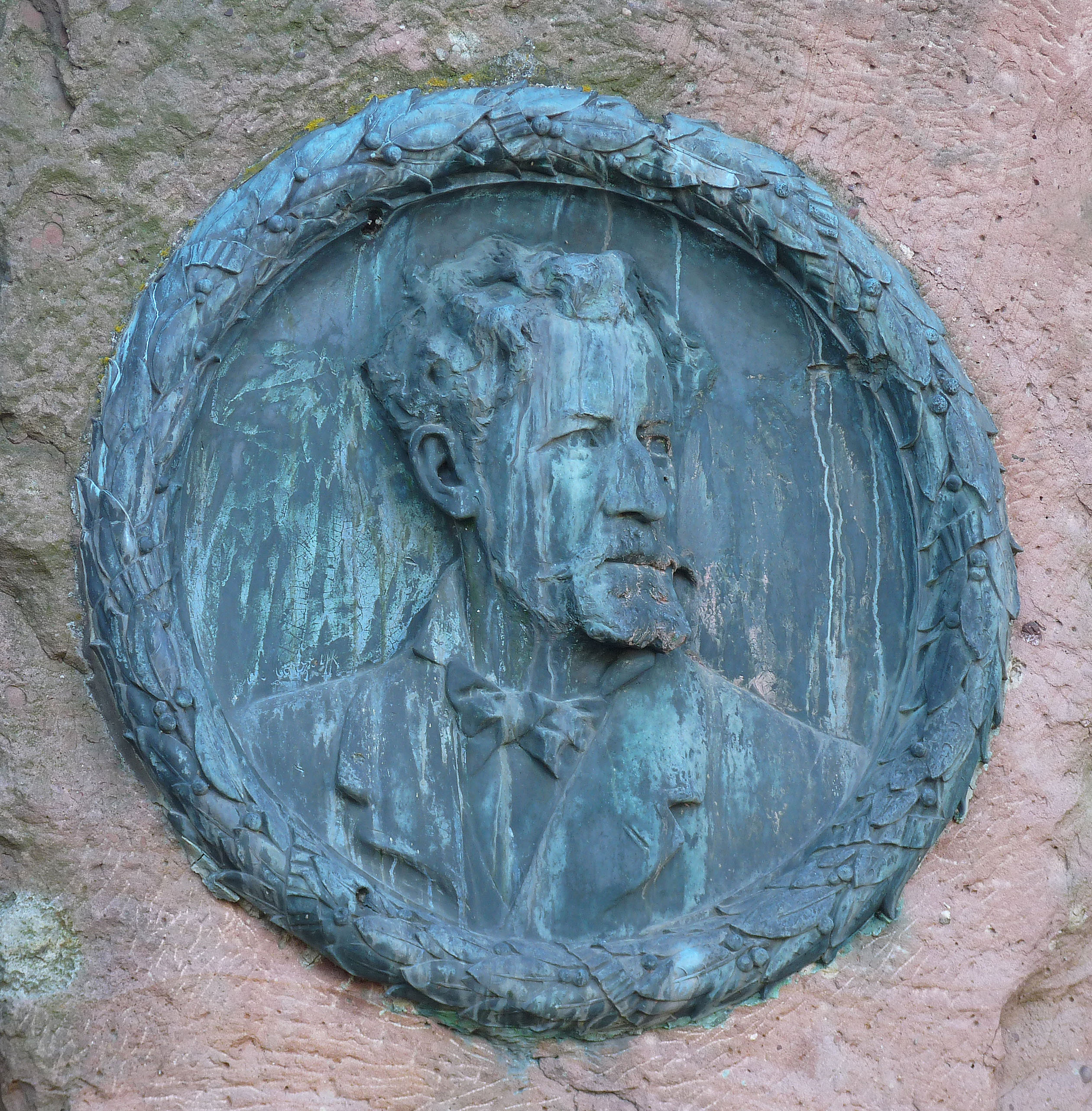 Wissembourg (Bas-Rhin) : fontaine dédiée à Joseph von Stichaner, qui fut Kreisdirektor de Wissembourg de 1871 à 1886